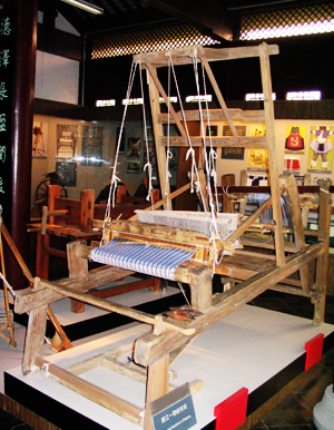 中文（中国大陆）: 经过photoshop自己处理调整了相关色彩和明暗度